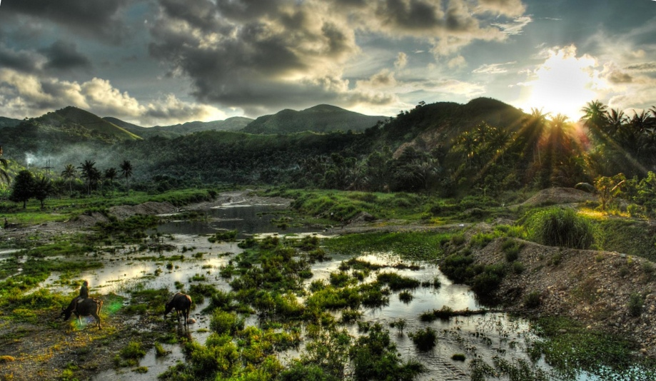 Unidos, Nabas, Aklan, Philippines